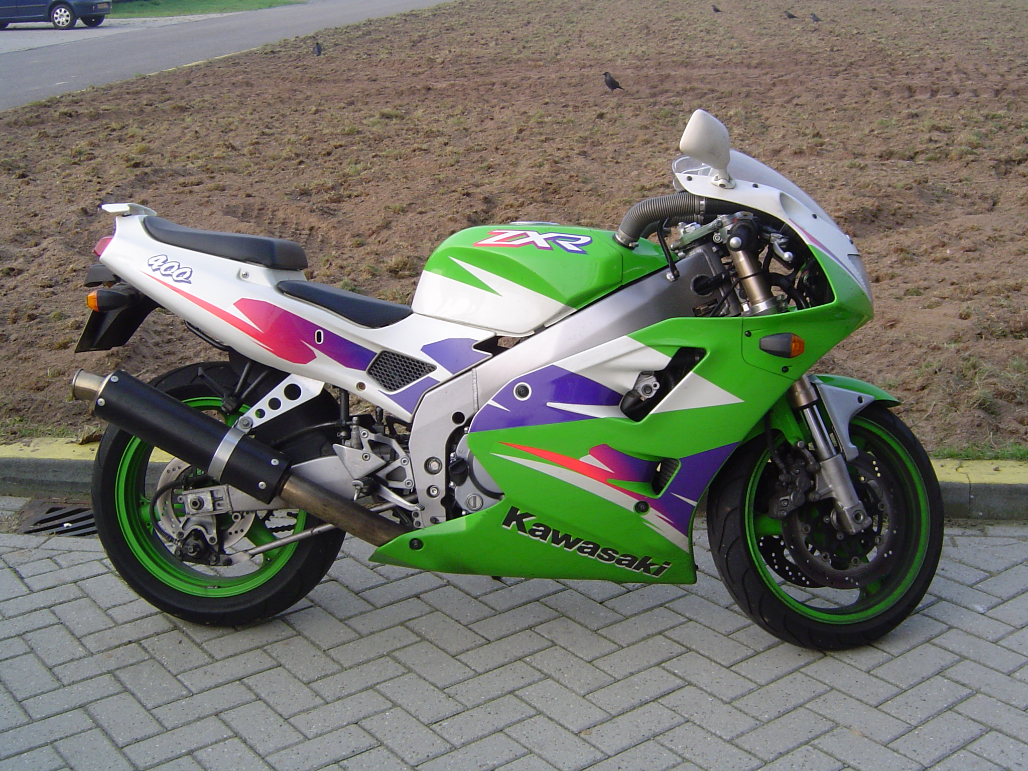 Kawasaki ZXR400.